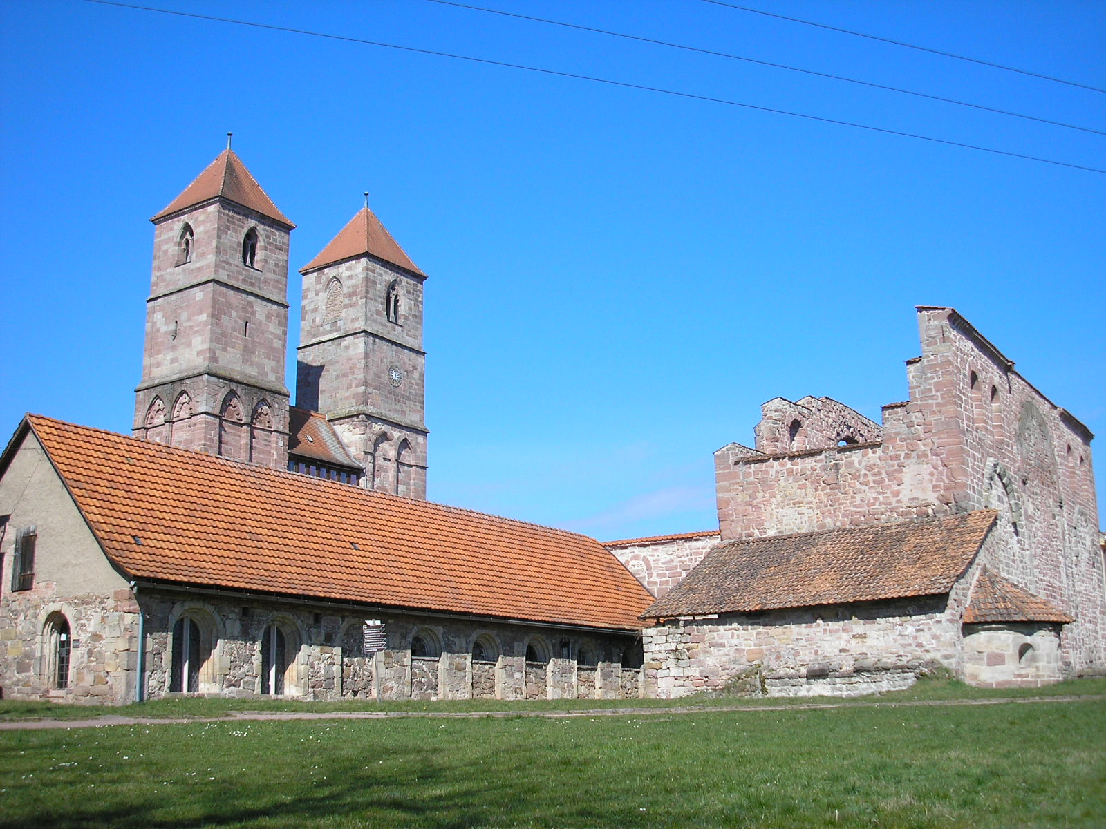 Kloster Veßra in Thüringen.